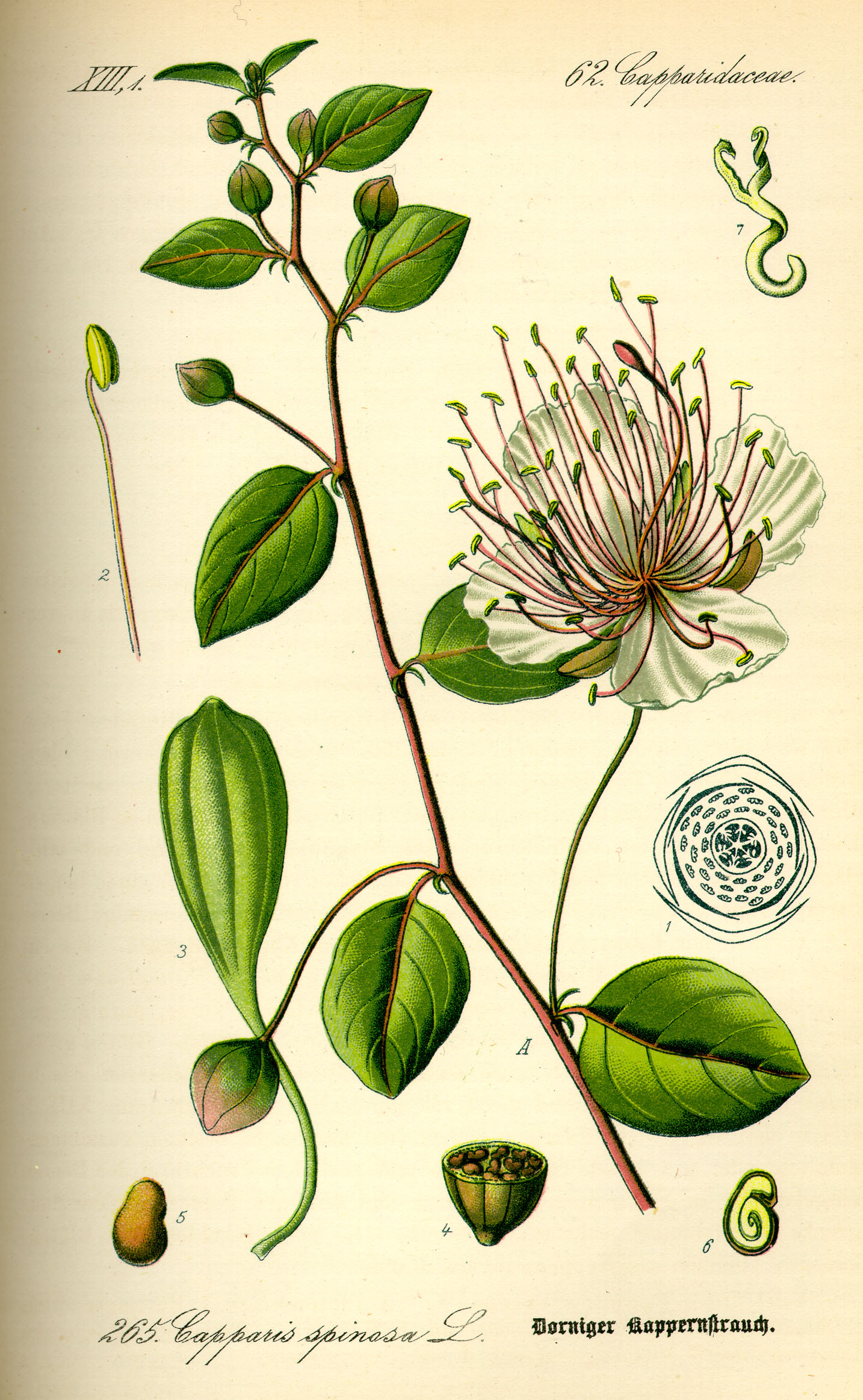 Capparis spinosa L. = Caper